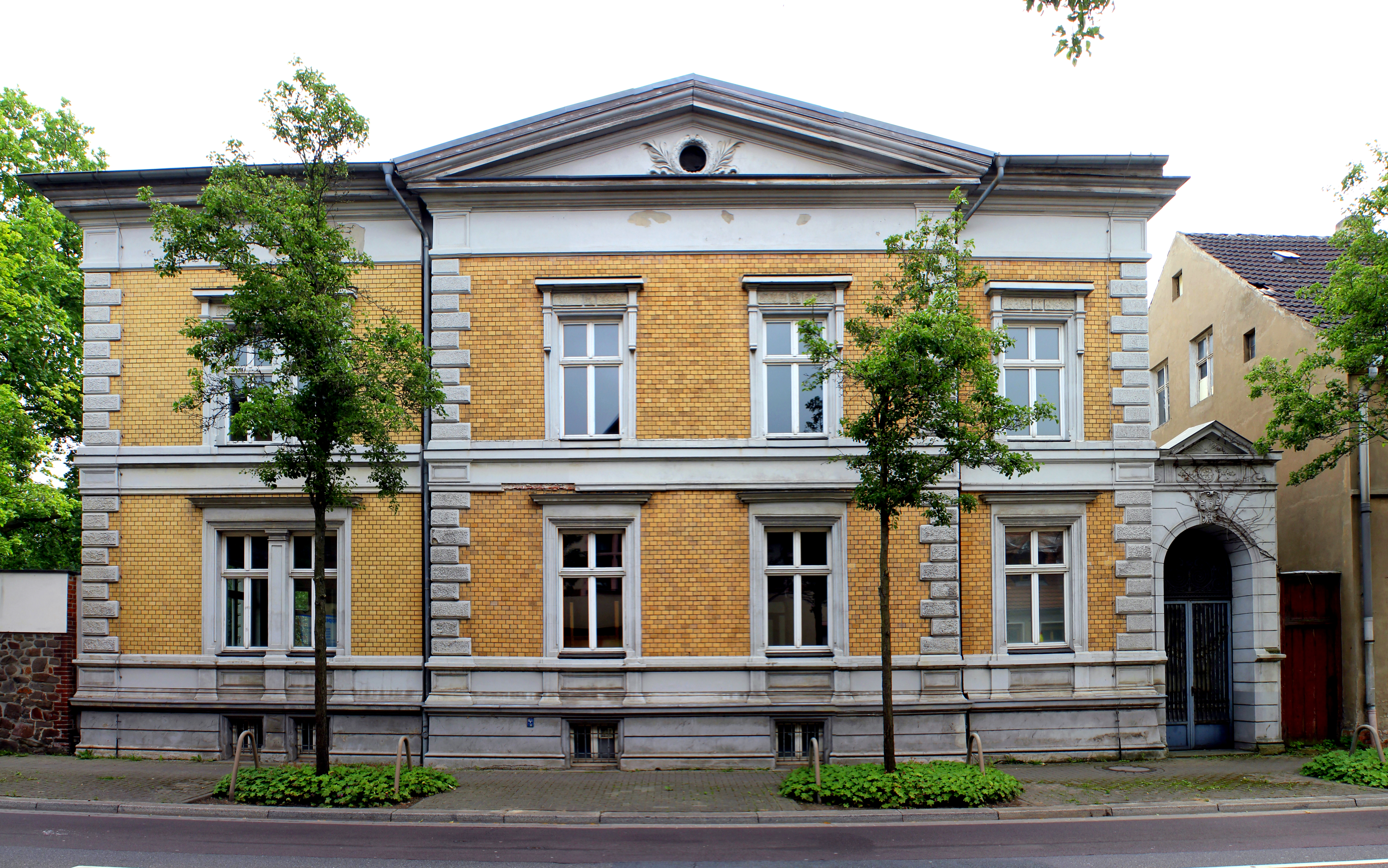 Wohnhaus, Mittagstraße 15a, Magdeburg